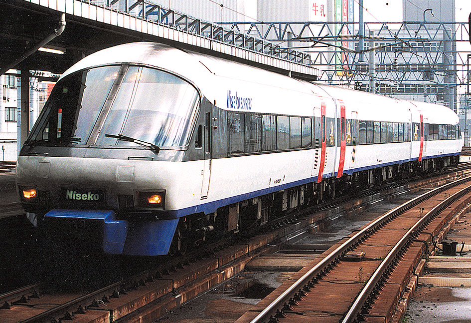 JR北海道 キハ183系ニセコエクスプレス